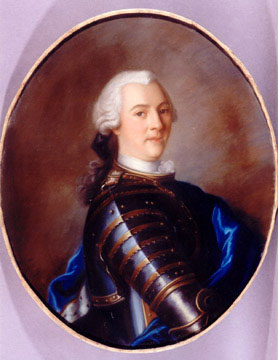 Emmanuel Félicité de Durfort de Duras (1715-1789), maréchal de France en 1775